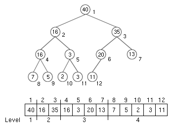 Heap mat entspriechendem Tableau dozou.